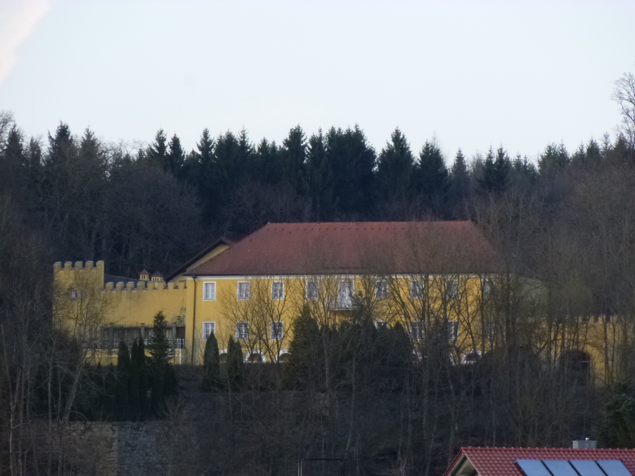 Das Schloss Steinburg ist bewohnt und gehört zur Liste der Baudenkmäler in Hunderdorf (D-2-78-139-23). Es liegt auf einer kleinen Anhöhe über dem Ort Steinburg, Gemeinde Hunderdorf. Von der Straße her ist das Schloss nur im Winter gut sichtbar, da es nicht durch das Laub der Bäume verdeckt wird.